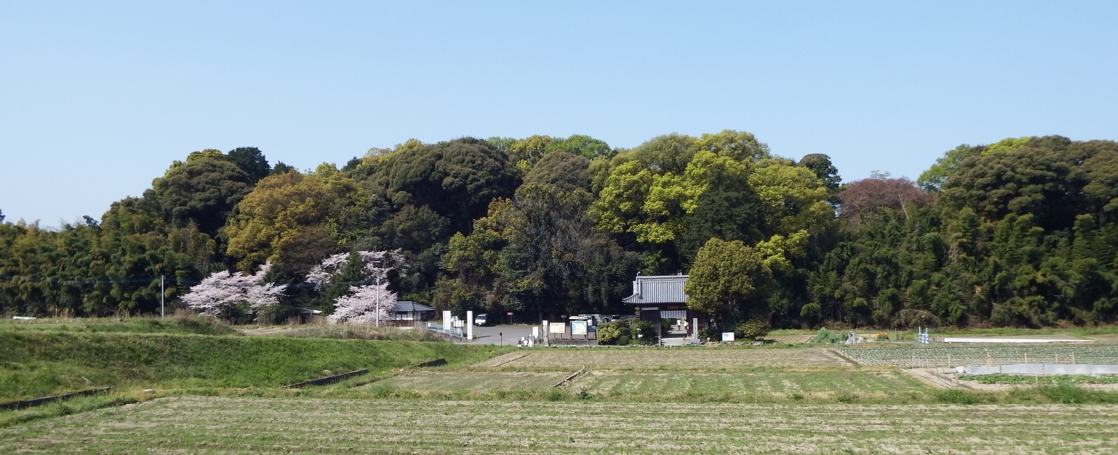 大興寺の遠景